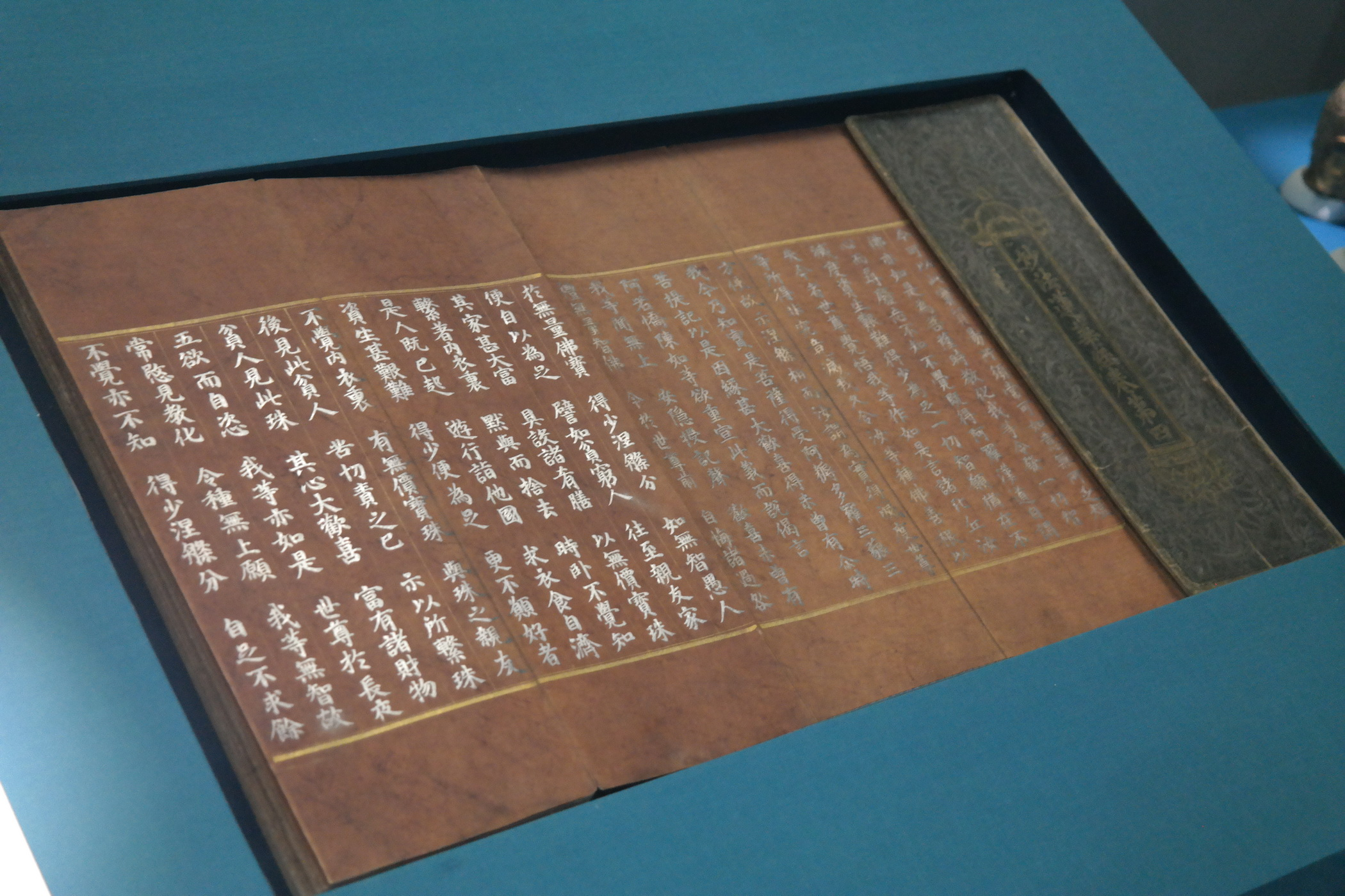 대한민국 국보 제185호, 상지은니묘법연화경(橡紙銀泥妙法蓮華經). 상수리 나무 열매로 물들인 갈색 종이 위에 은으로 글씨를 썼다. 7권7첩의 완질본중 권제4(卷第四). (국립광주박물관 소장)